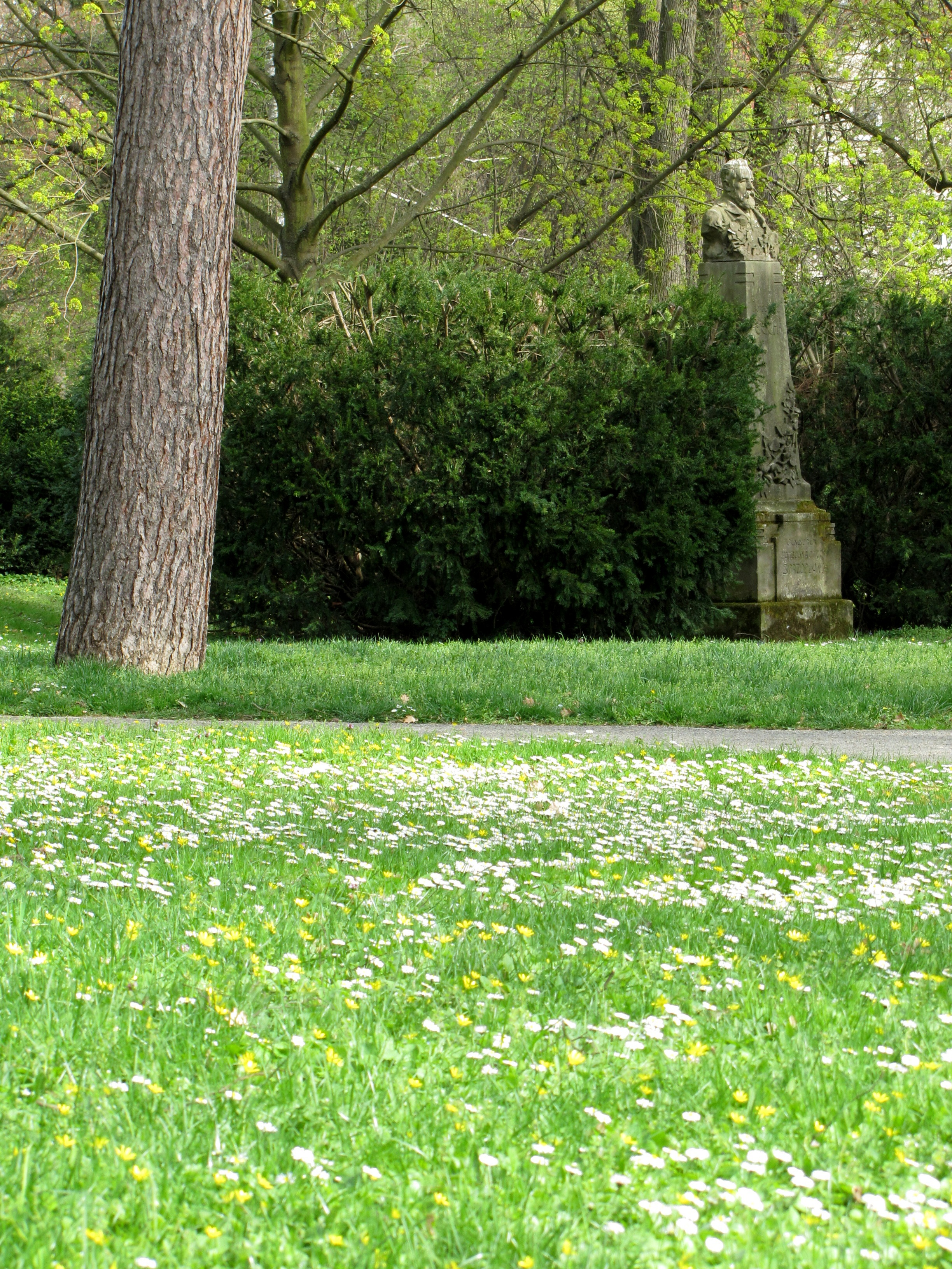 Městský park v Kyjově a pomník Svatopluka Čecha